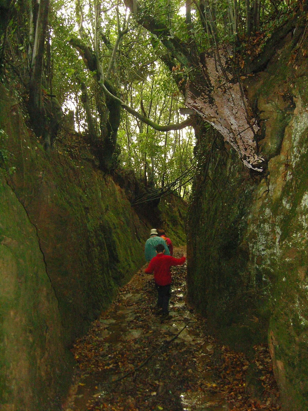 Unha corredoira misteriosa. Un corgo que mete medo. O da Carballa!